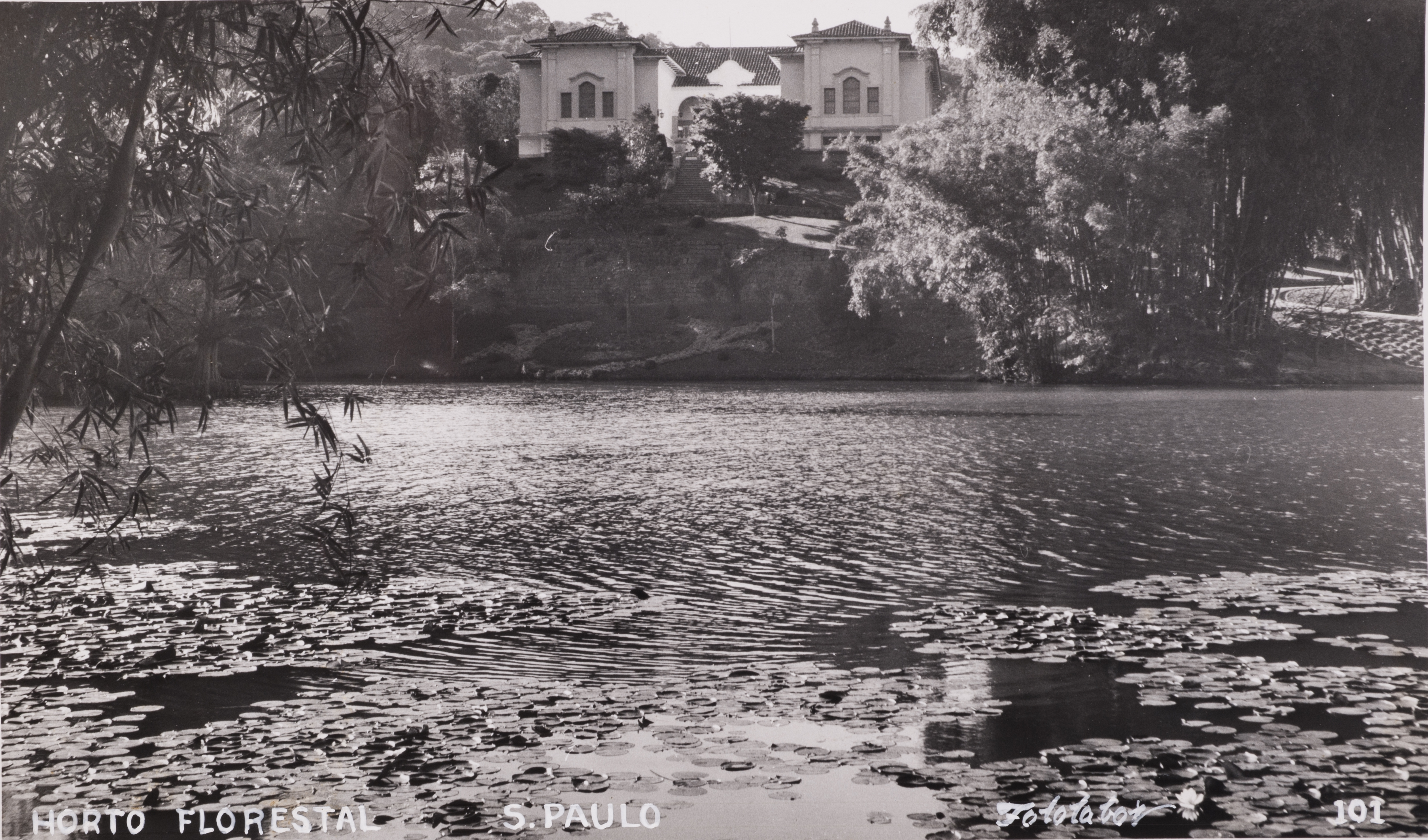 Obra que integra o acervo do Museu Paulista da USP. Coleção Werner Haberkorn - CHW